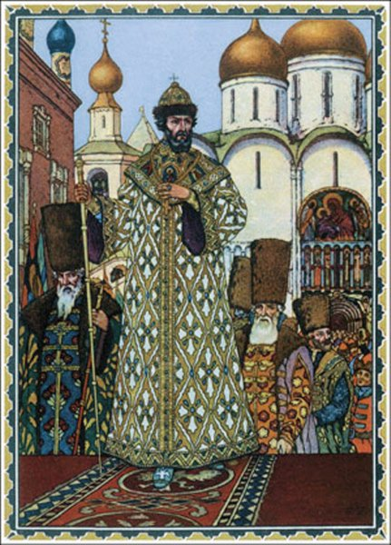 Иллюстрации Борис Годунов - Александр Пушкин